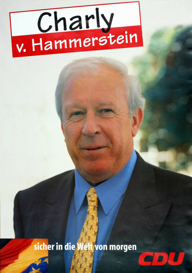 Charly v. Hammerstein sicher in die Welt von morgen CDU Abbildung:FotoPlakatart:Kandidaten-/Personenplakat mit PorträtObjekt-Signatur:10-001: 5037Bestand:Plakate zu Bundestagswahlen (10-001)GliederungBestand10-18:Plakate zu Bundestagswahlen (10-001) » Die 14. Bundestagswahl am 27. September 1998 » CDU » Mit PorträtfotoLizenz:KAS/ACDP 10-001: 5037 CC-BY-SA 3.0 DE